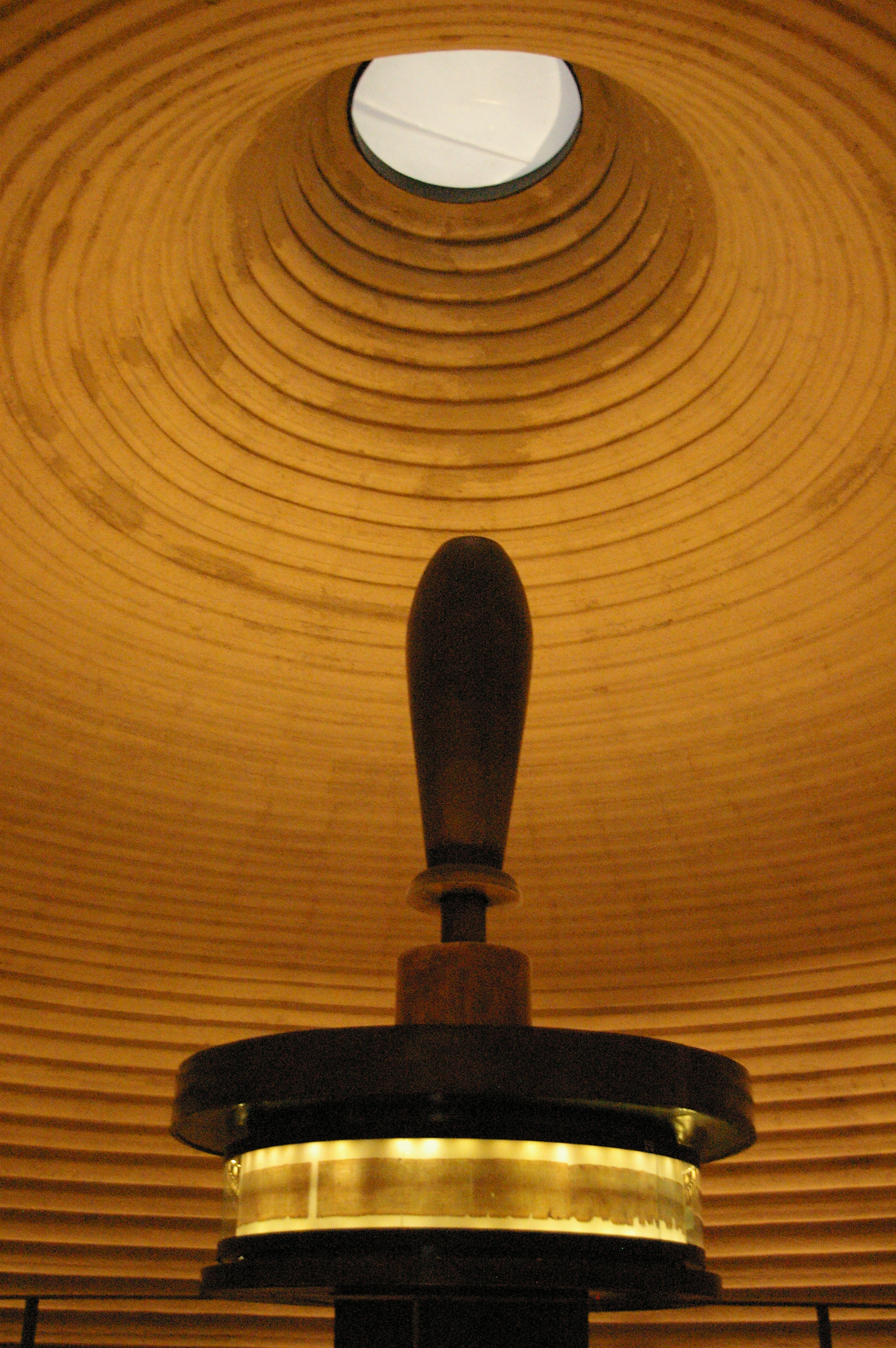 Copie du rouleau d'Isaïe exposée au Sanctuaire du livre